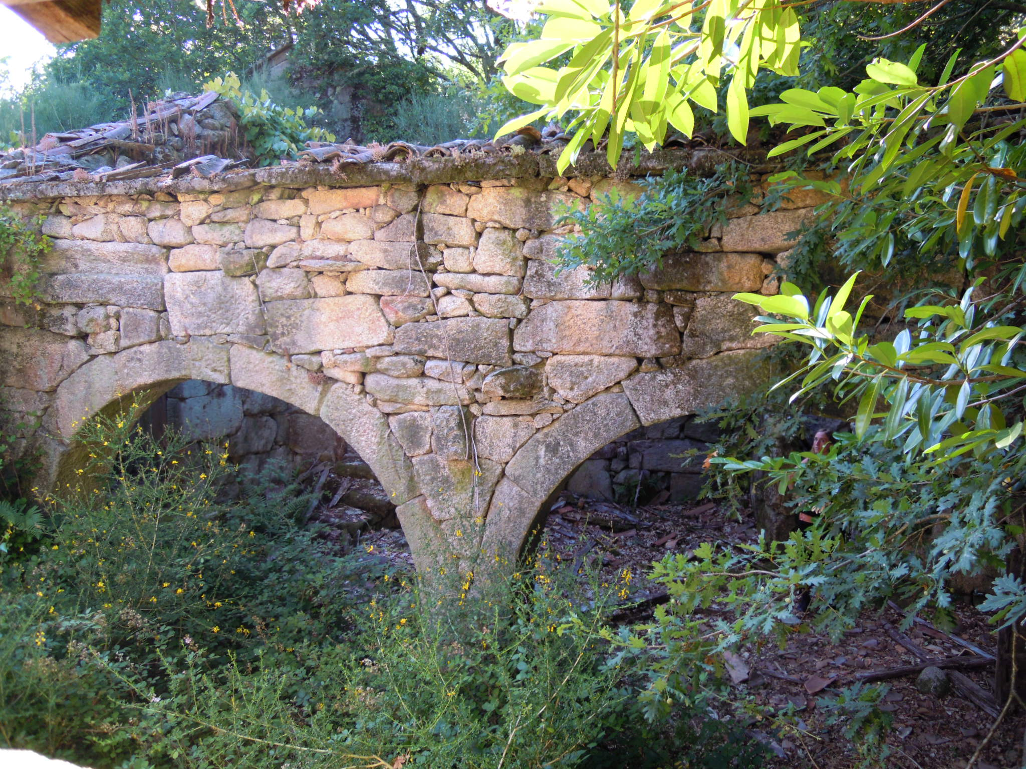 Arcos no patio interior da Casa da Peste, na Godela (Aguasantas, Cerdedo-Cotobade).